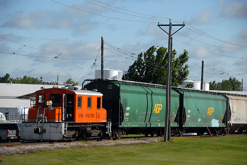 07 15 09 014xRP